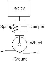 通常のダンパと発条によるサスペンション